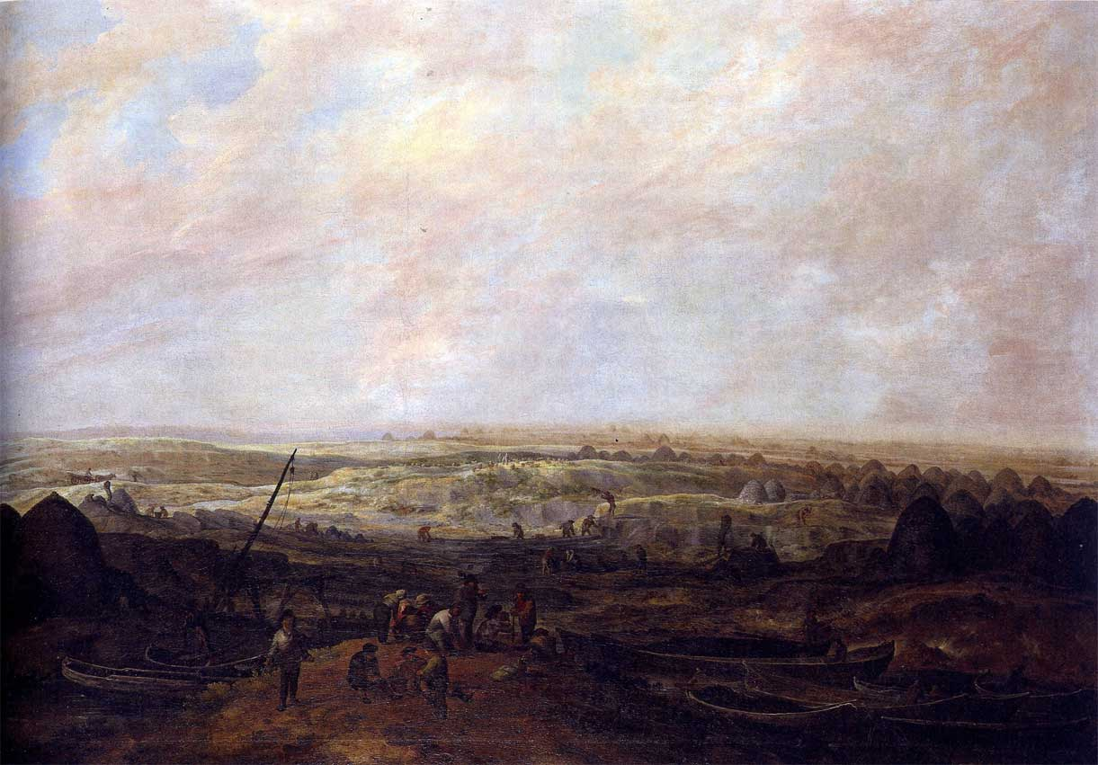 Hoogveenontginning waarschijnlijk in de omgeving van Wildervank